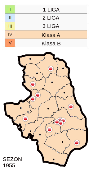 Jagiellonia w sezonie 1955 - mapa klubów